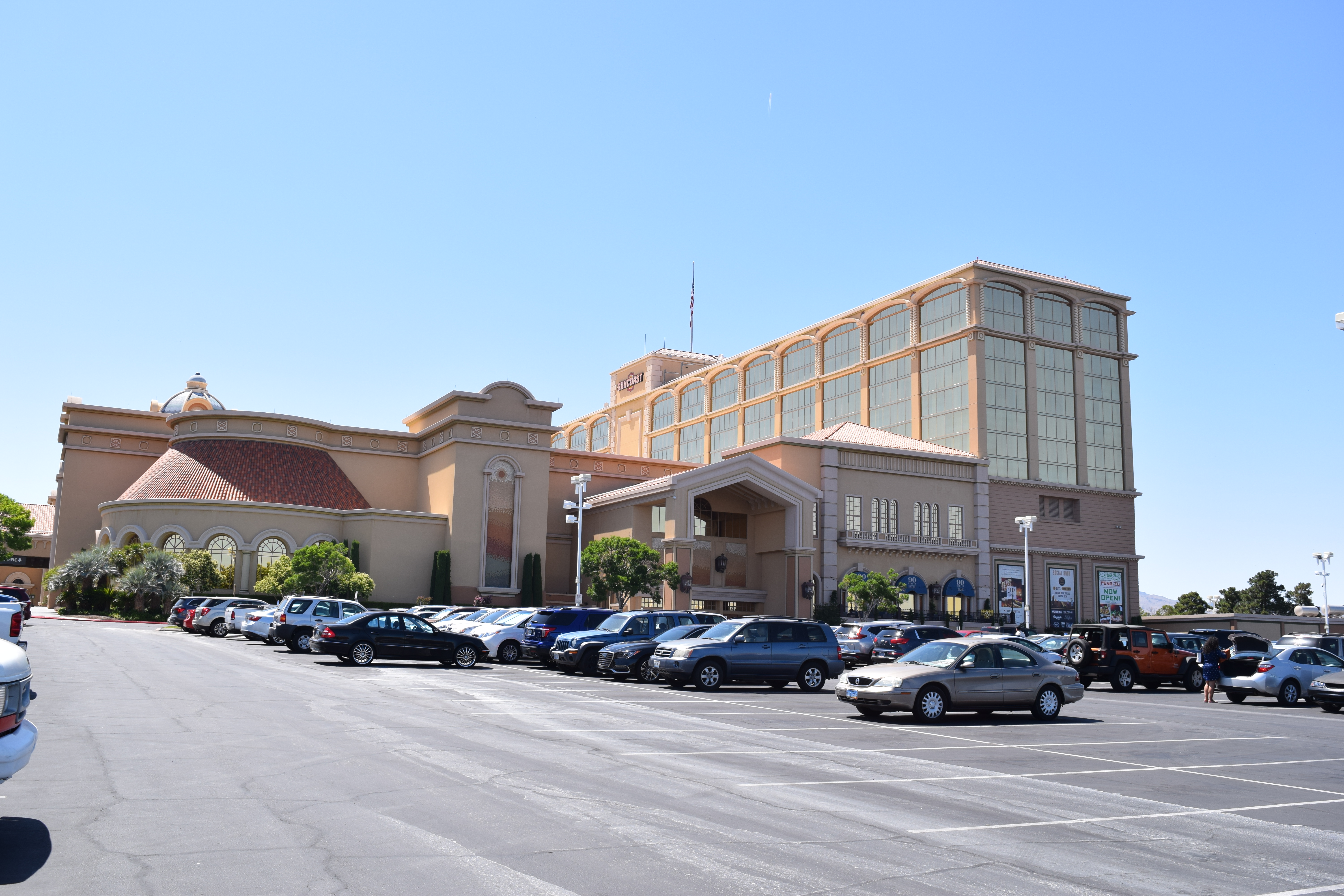 Suncoast Casino, Las Vegas